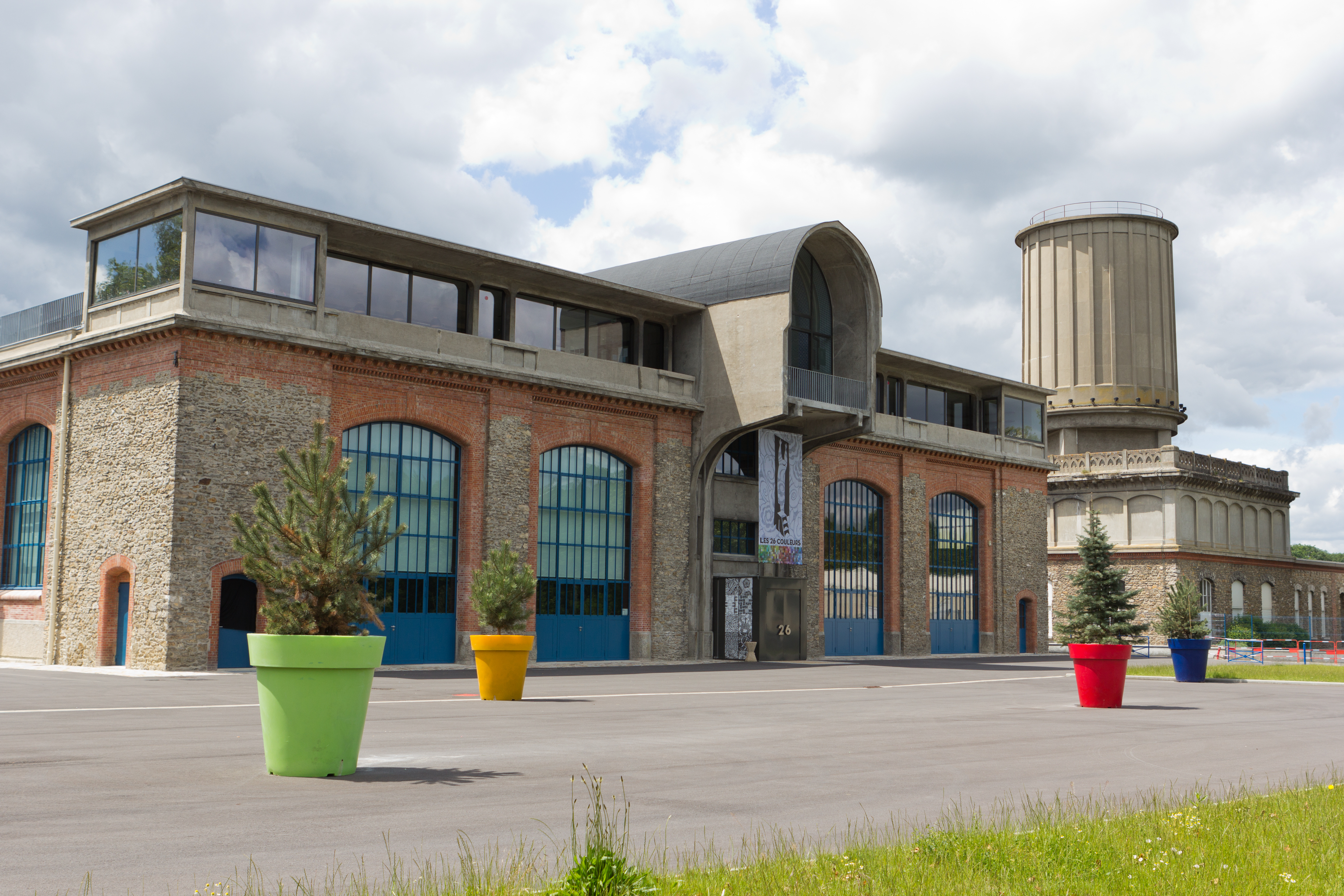 Ancienne usine Leroy (Espace 26 couleurs), Saint-Fargeau-Ponthierry, Seine-et-Marne, France